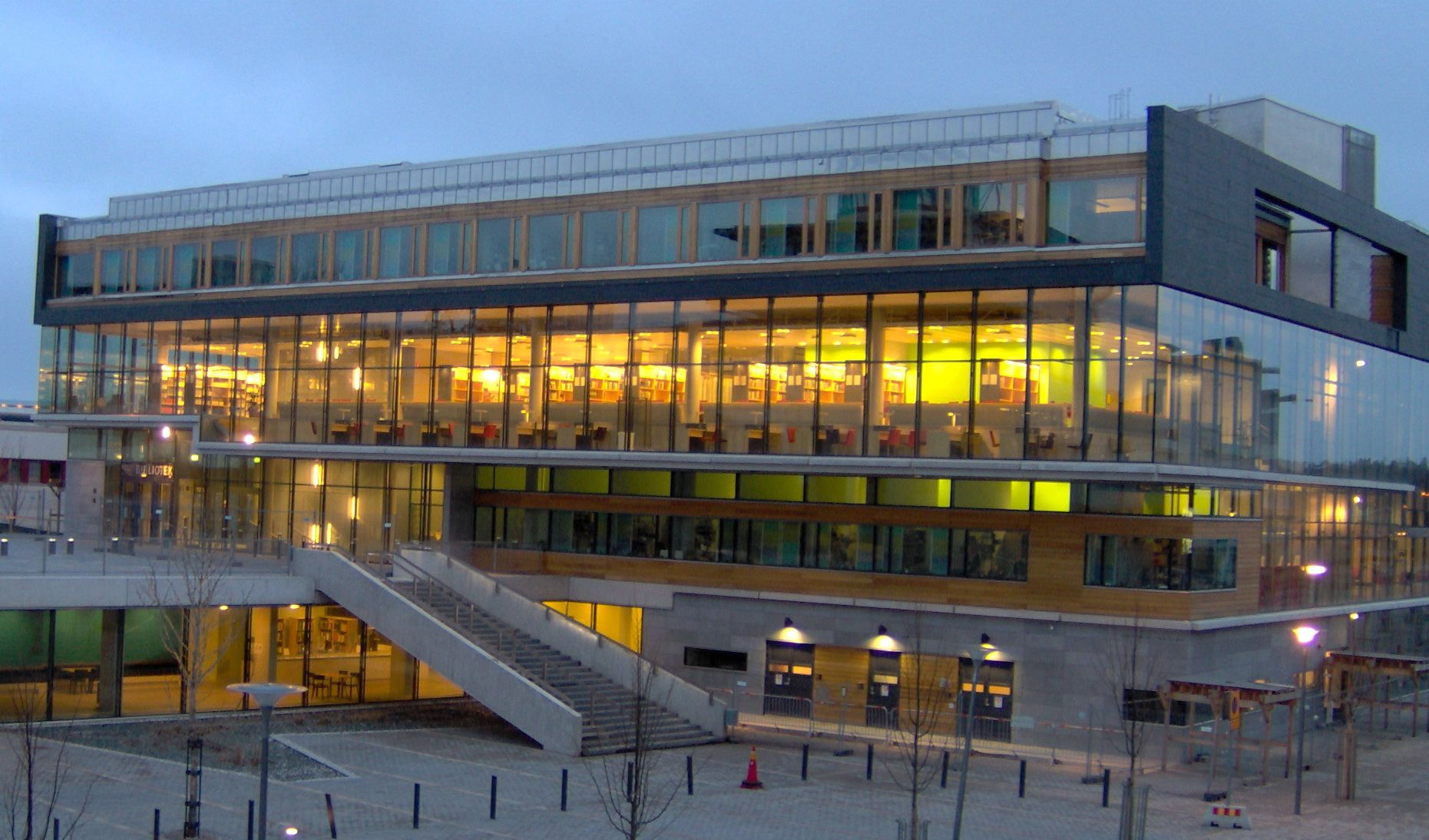 Södertörns högskolebibliotek, Flemingsberg, Huddinge kommun, sydvästra Storstockholm på kvällen.